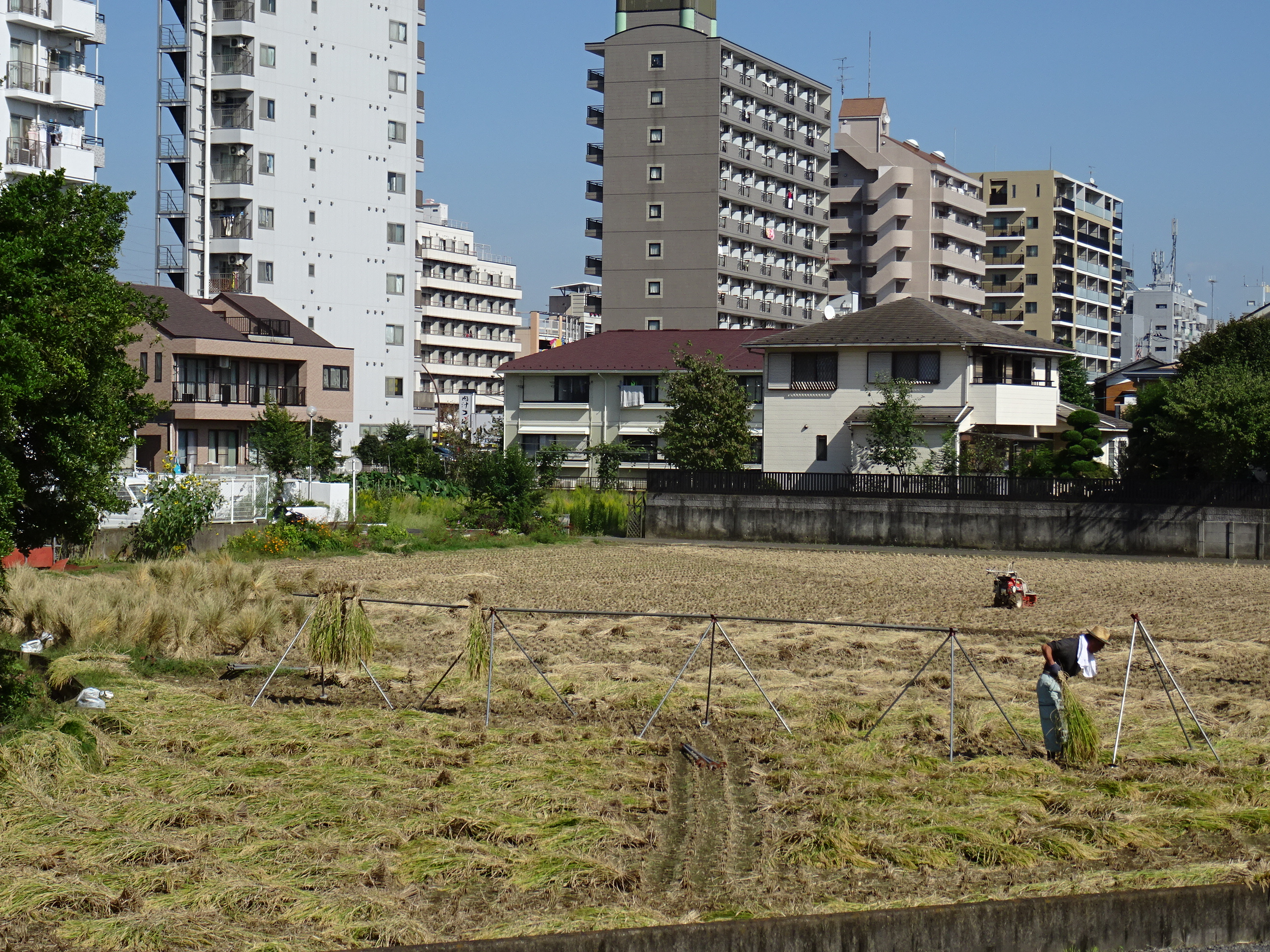 多摩市の都市化に飲まれる農業（2015/10/03撮影）